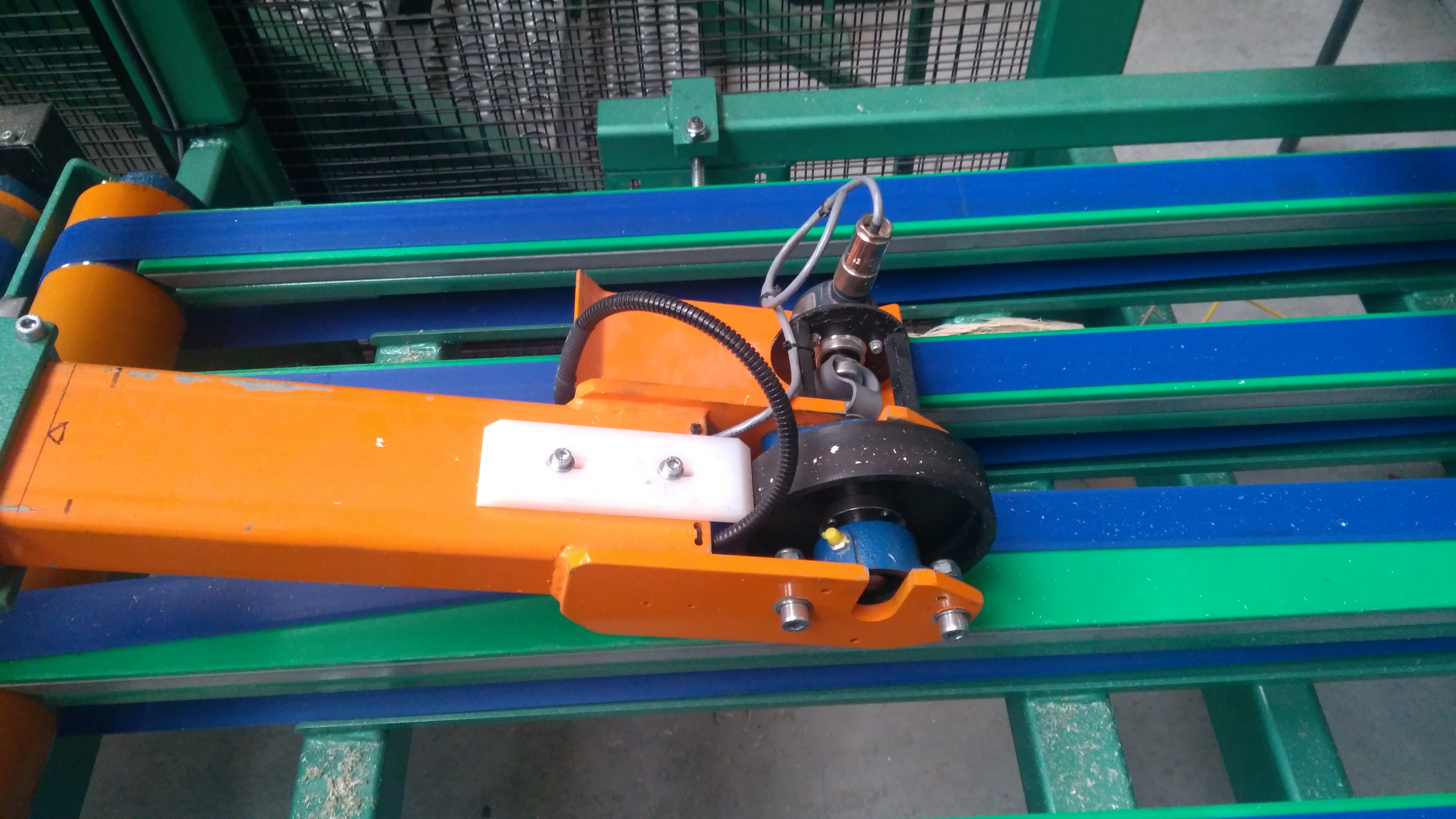 Afin de connaître l'avance de la feuille déroulée et de la couper à la bonne longueur, une roulette couplée à un codeur est utilisée.